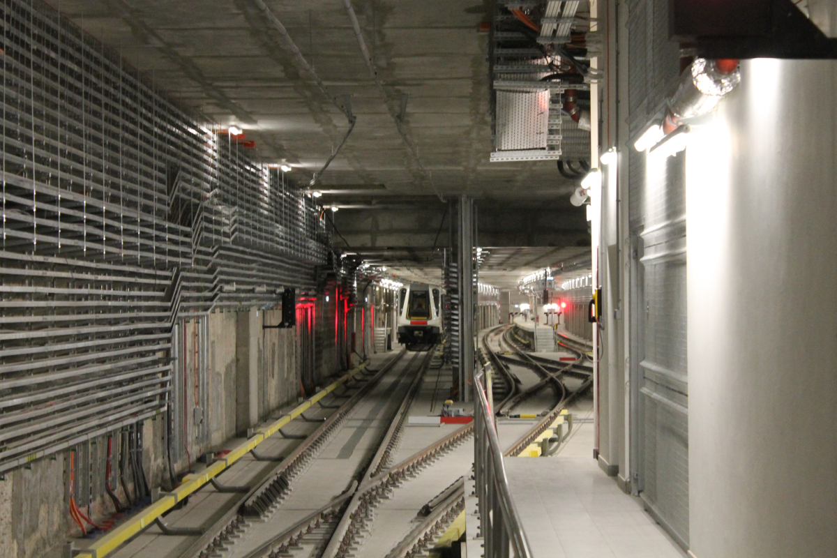 Tory odstawcze na zachód od stacji C9 Rondo Daszyńskiego.